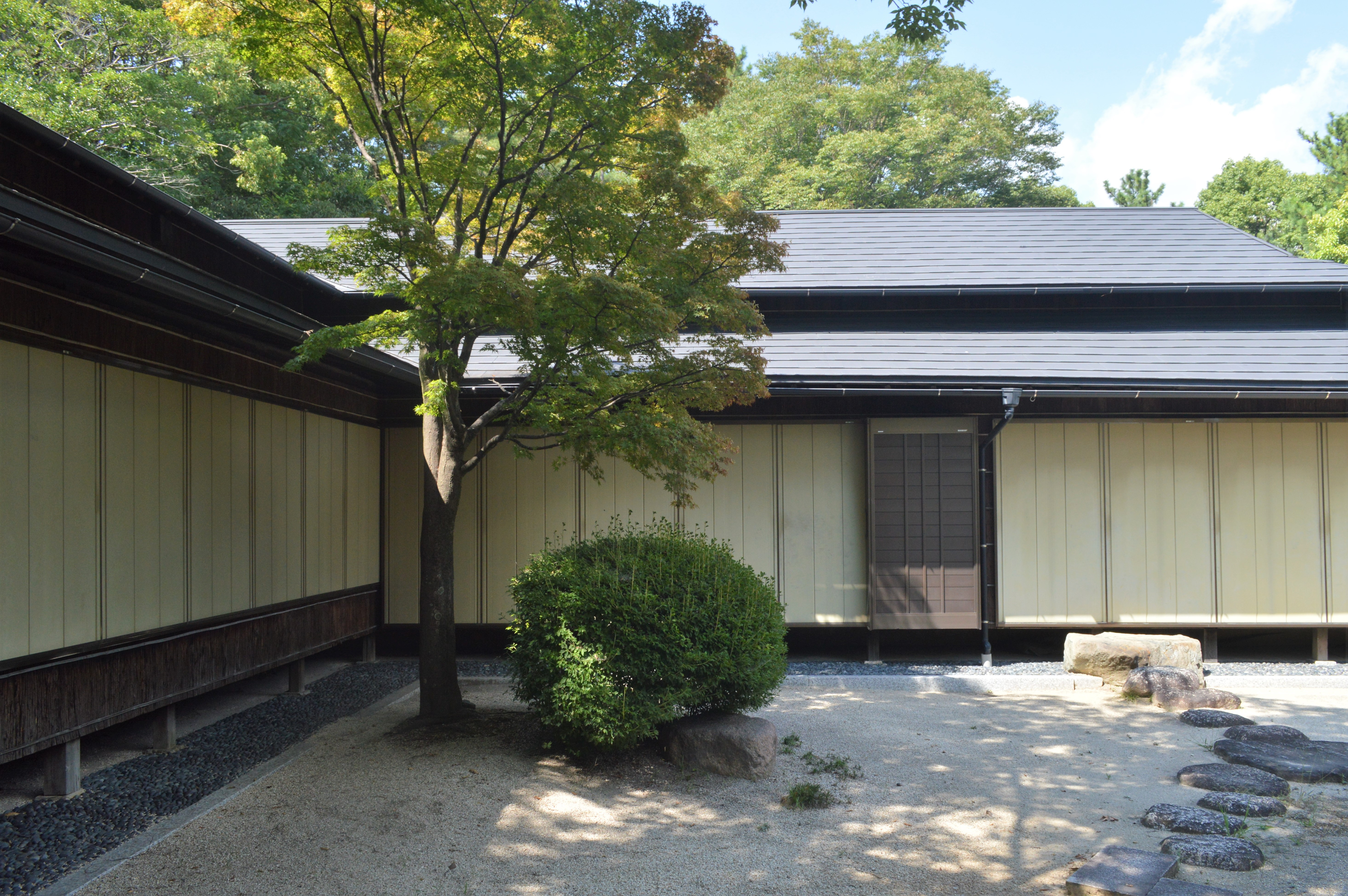 愛知県大府市の大倉公園。登録有形文化財に登録されている休憩棟。